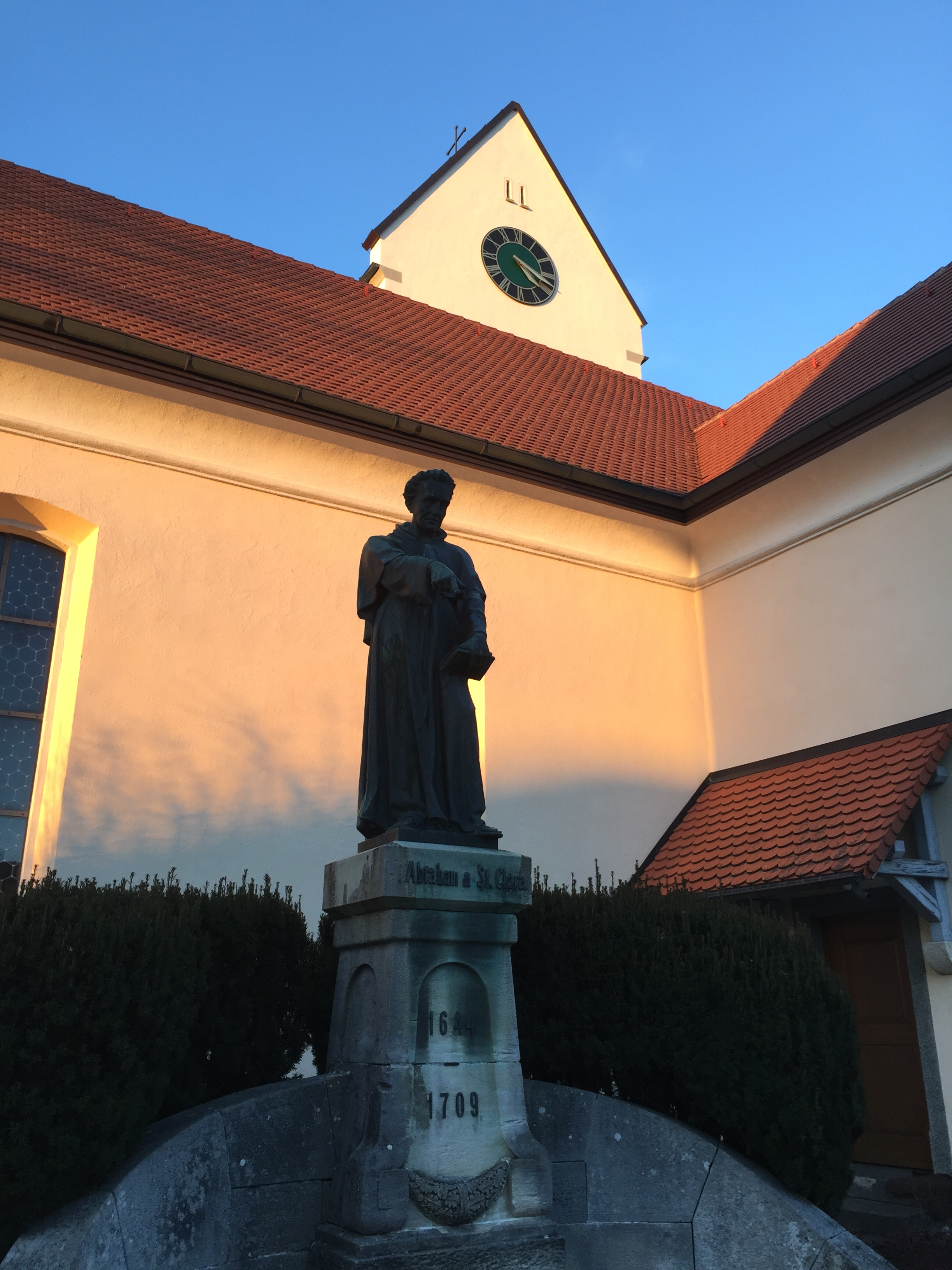 St. Michael (Kreenheinstetten), Statue von Abraham a Santa Clara